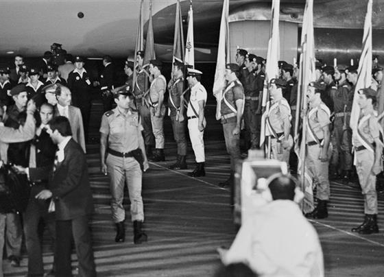 נשיא מצרים, אנואר סאדאת מגיע ללוד, נמל תעופה בן גוריון בביקור בישראל. דגלנים בטקס.